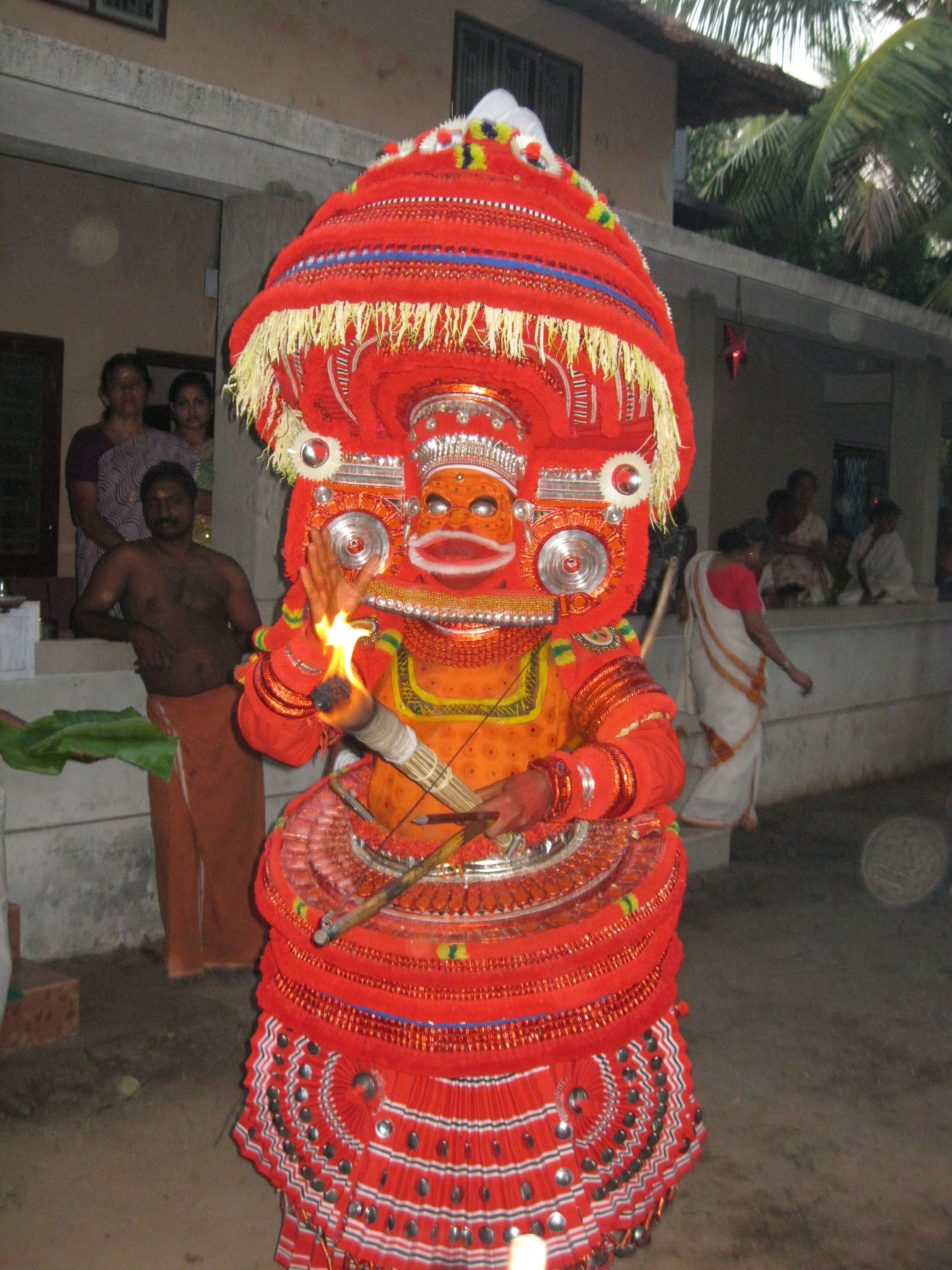 തൊണ്ടച്ചൻ തെയ്യം,കണ്ണൂർ ജില്ലയിലെ പല തറവാട്ട് സ്ഥാനങ്ങളിലും ഈ തെയ്യം കെട്ടിയാടുന്നു